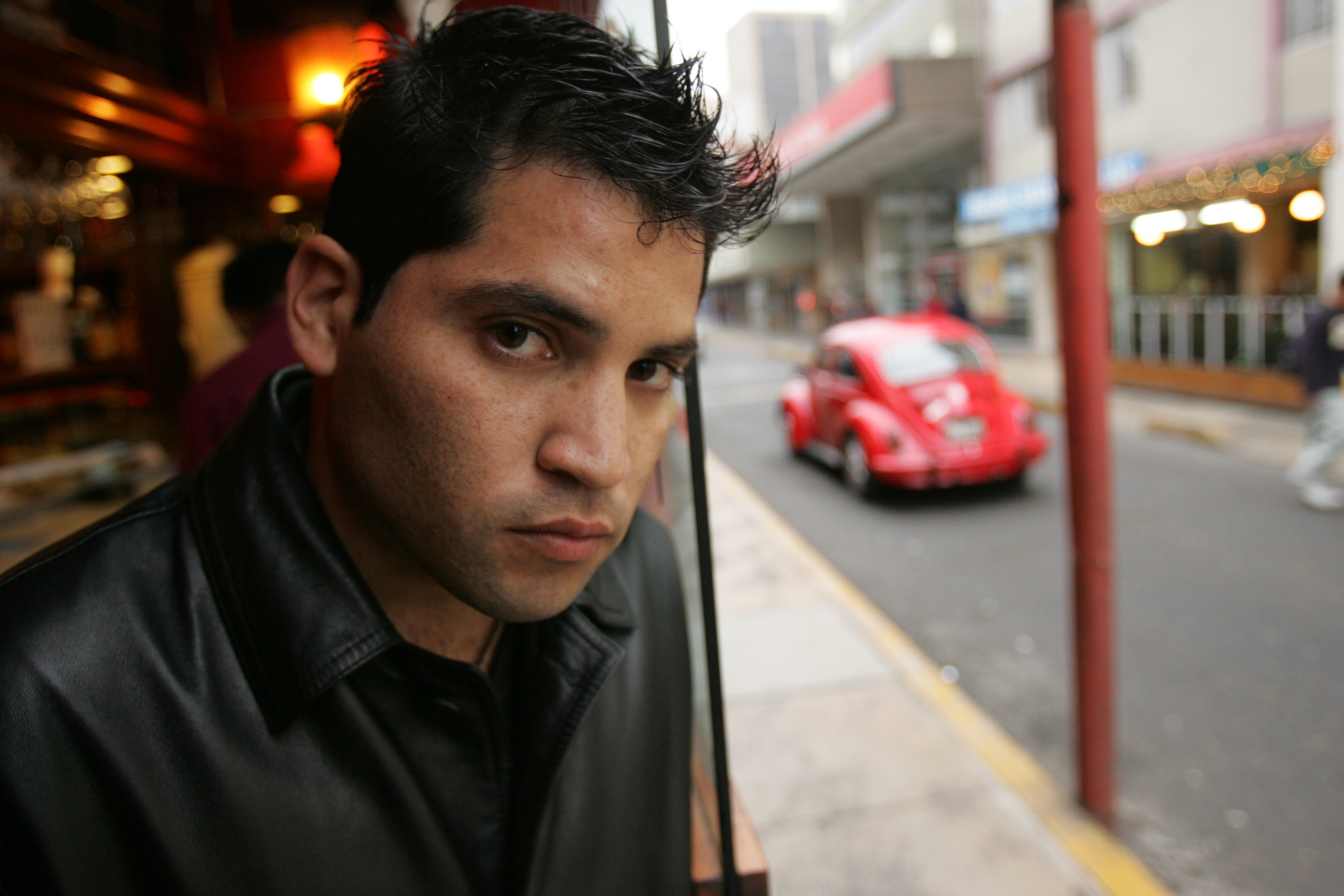 Foto tomada en Lima por Alfredo Giraldo para el autor.